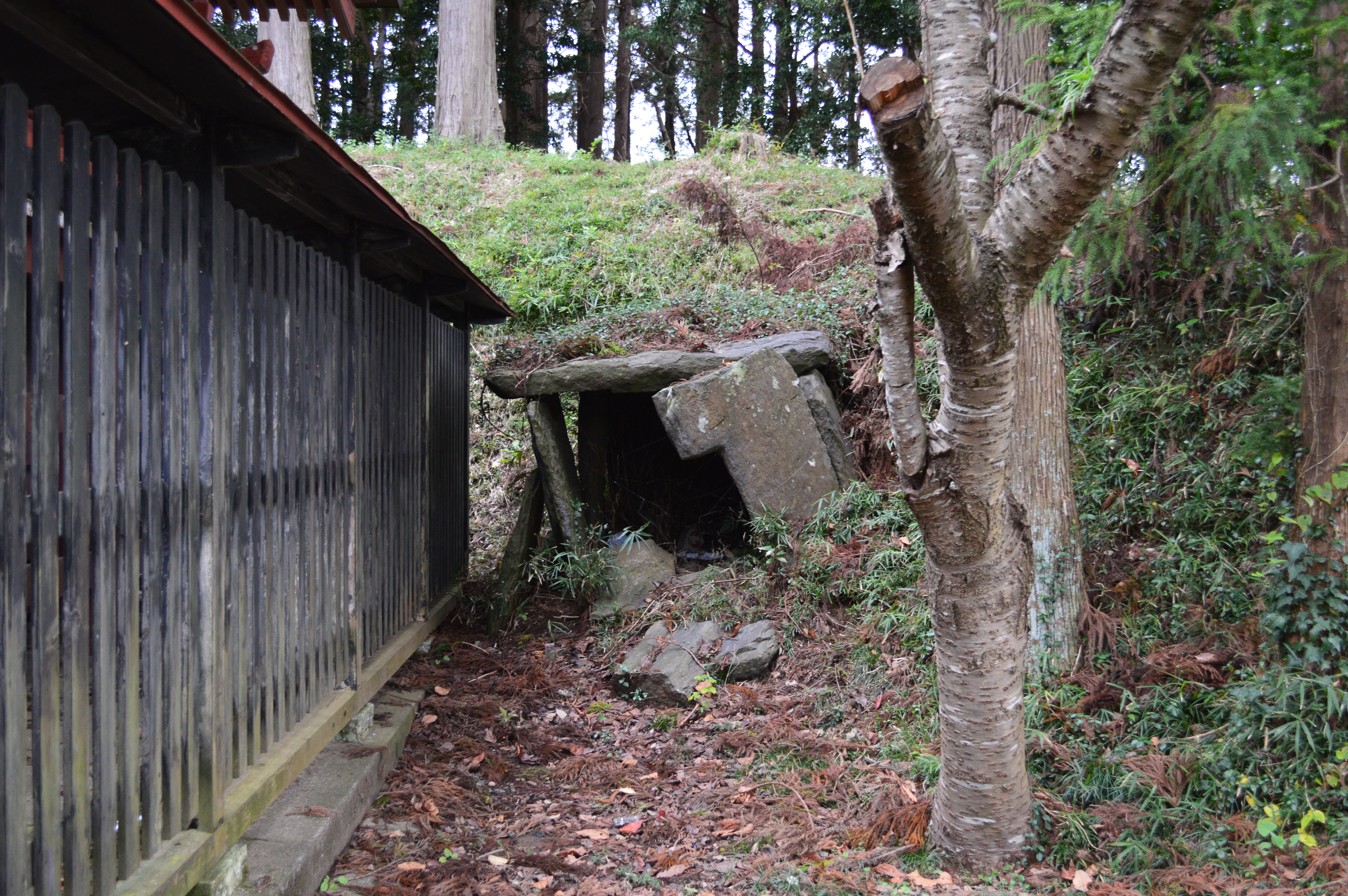 又見古墳 石室